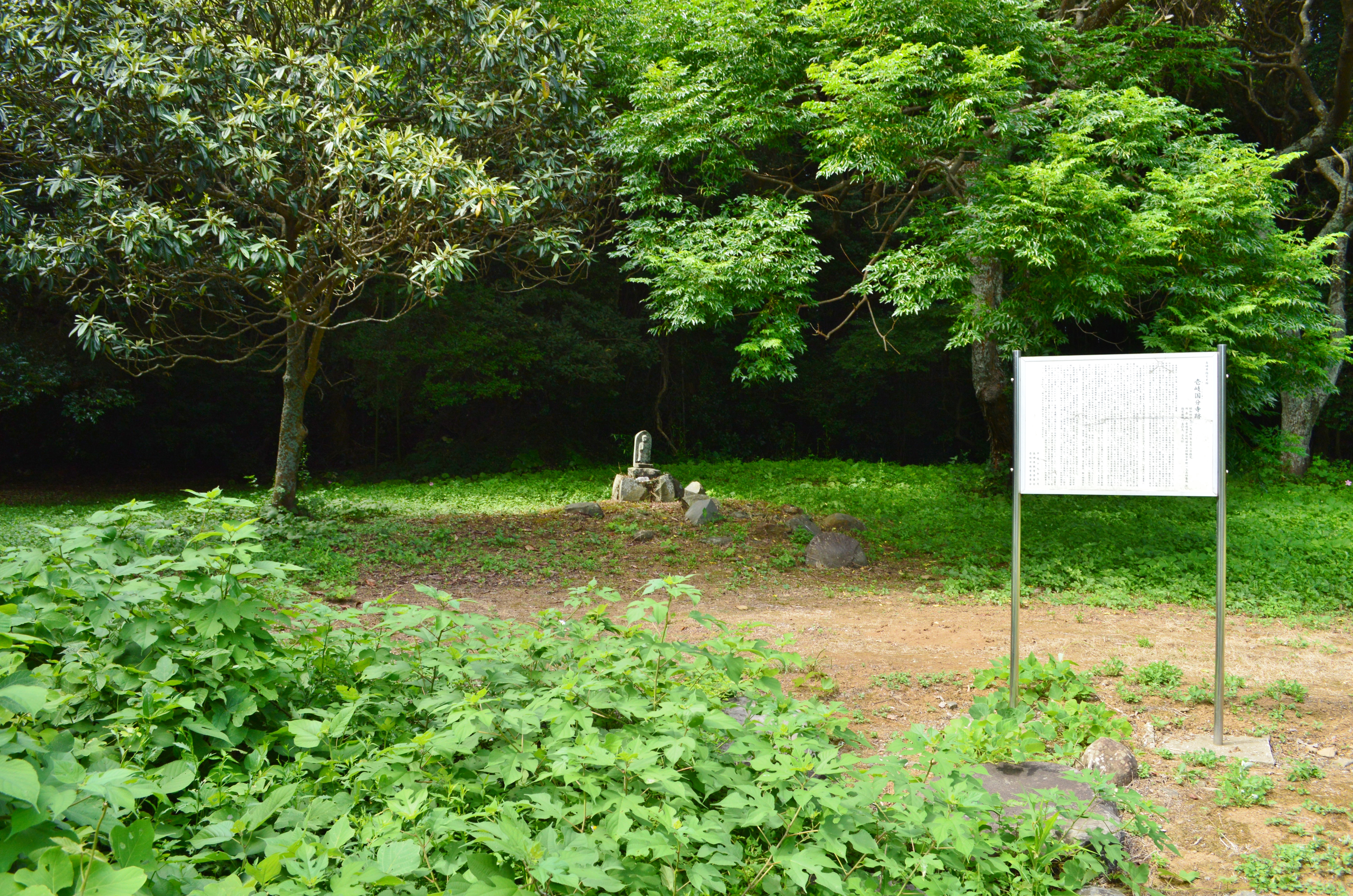 壱岐国分寺跡 説明板付近